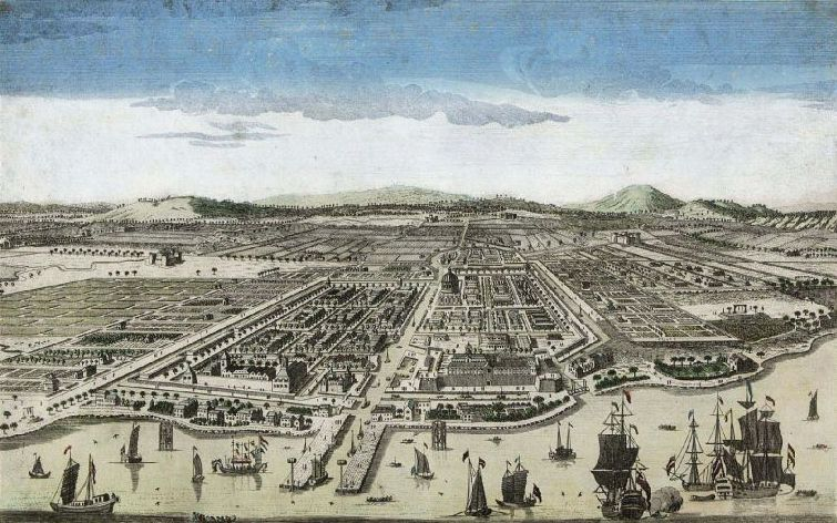 Prent. Opticaprent.. De stad Batavia